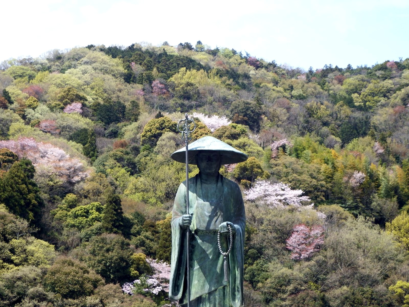 椿堂の修行大師